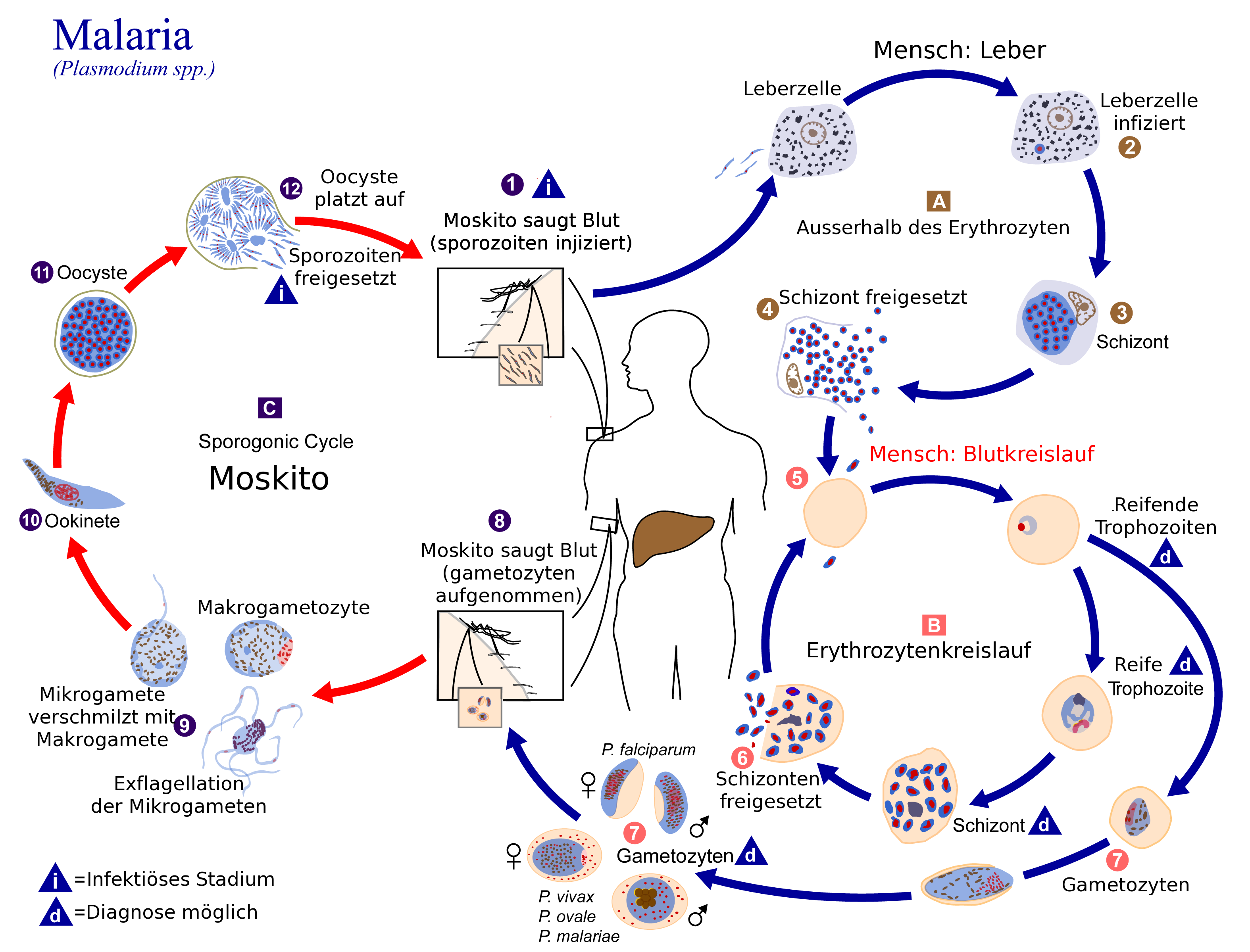 Plasmodium Entwicklungszyklus